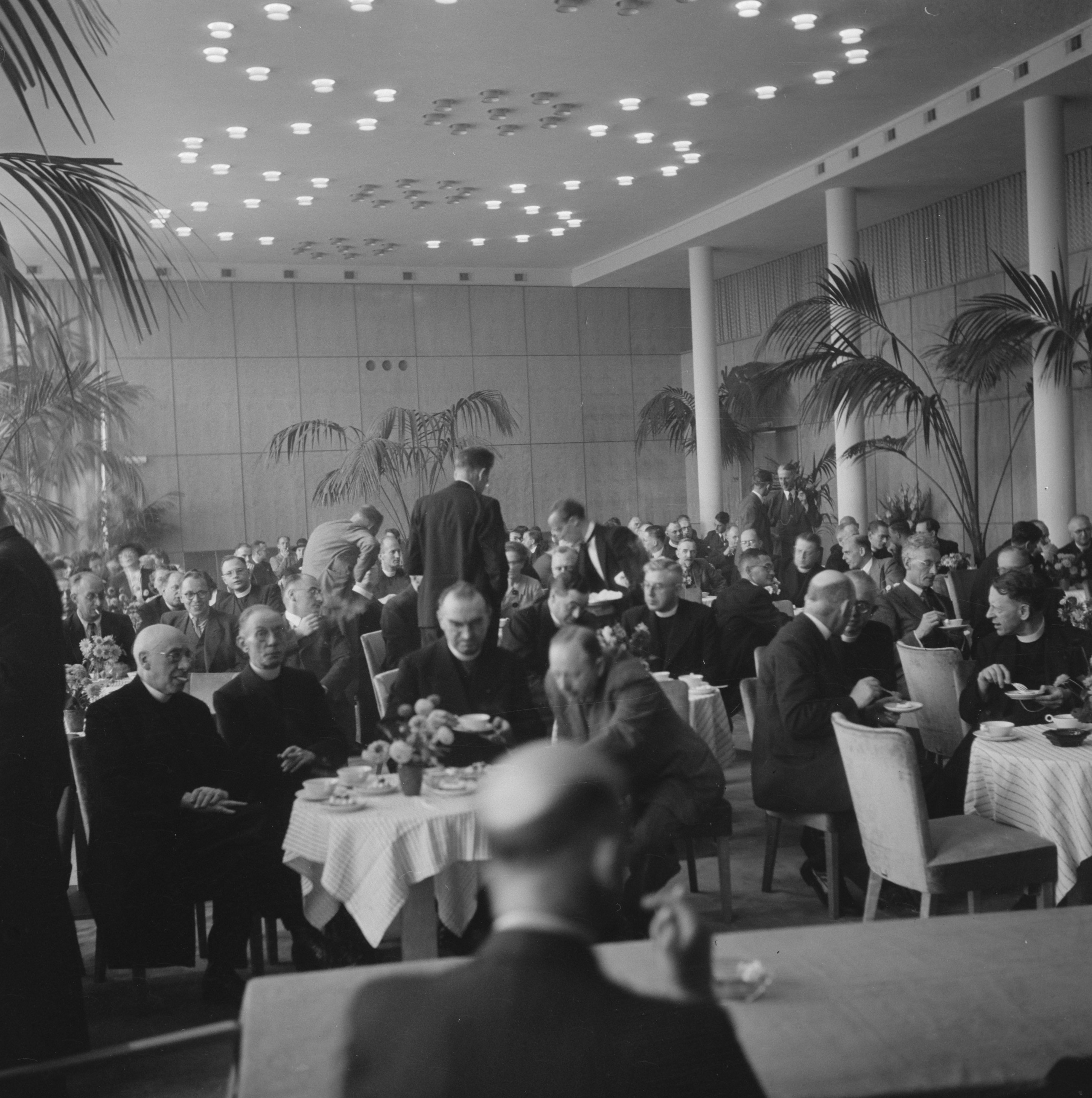 Collectie / Archief : Fotocollectie Anefo Reportage / Serie : Godsdienst : Congres Rooms-Katholieke Actie Beschrijving : Congres van de Katholieke Actie te Utrecht. Datum : 20 september 1945 Locatie : Utrecht (stad) Trefwoorden : congressen, godsdiensten Fotograaf : Fotograaf Onbekend / Anefo Auteursrechthebbende : Nationaal Archief Materiaalsoort : Negatief (zwart/wit) Nummer archiefinventaris : bekijk toegang 2.24.01.03 Bestanddeelnummer : 900-8262